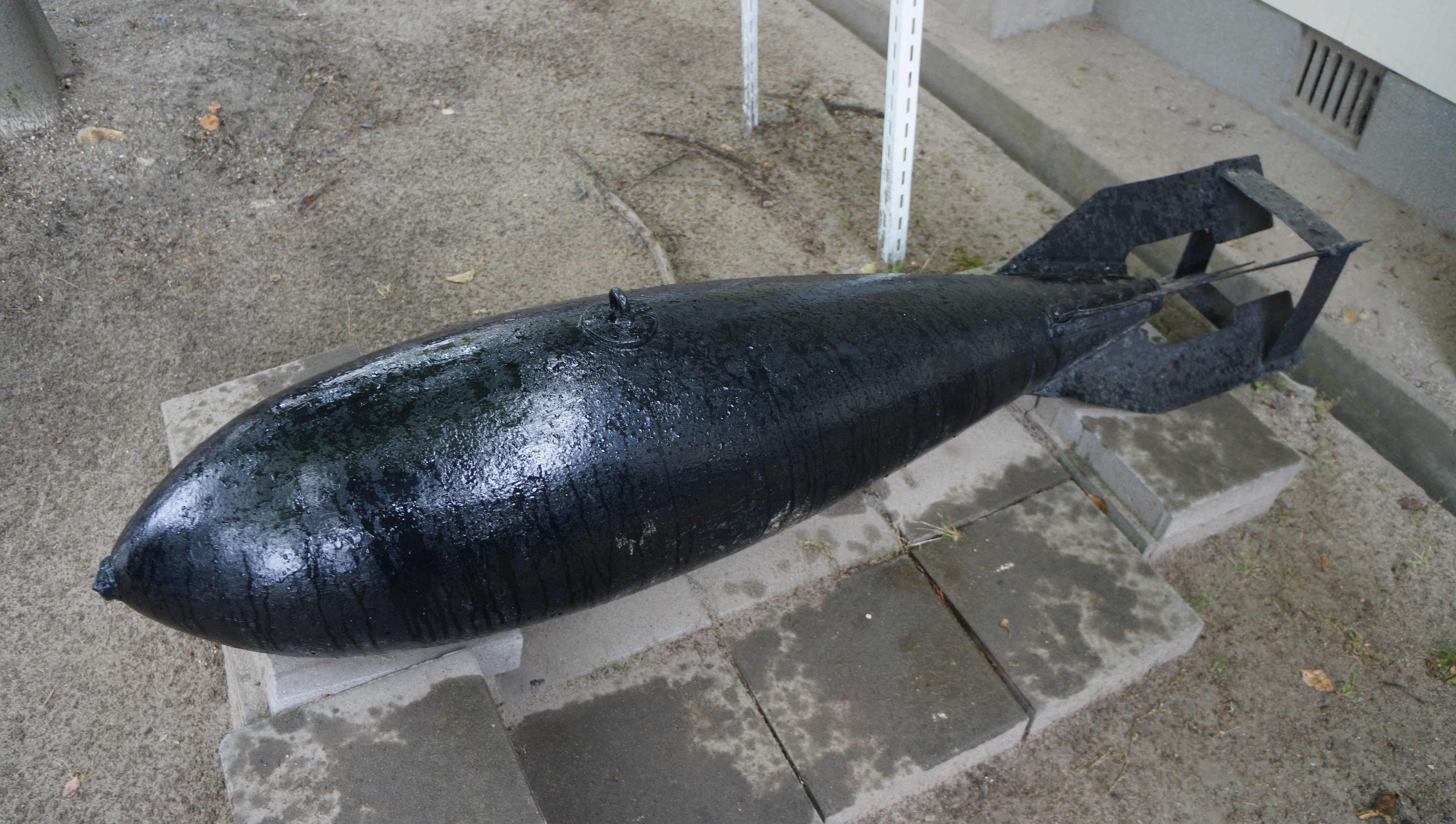 旧軍 航空機用250kg爆弾。 13年5月19日 陸上自衛隊千僧駐屯地資料室前にて。